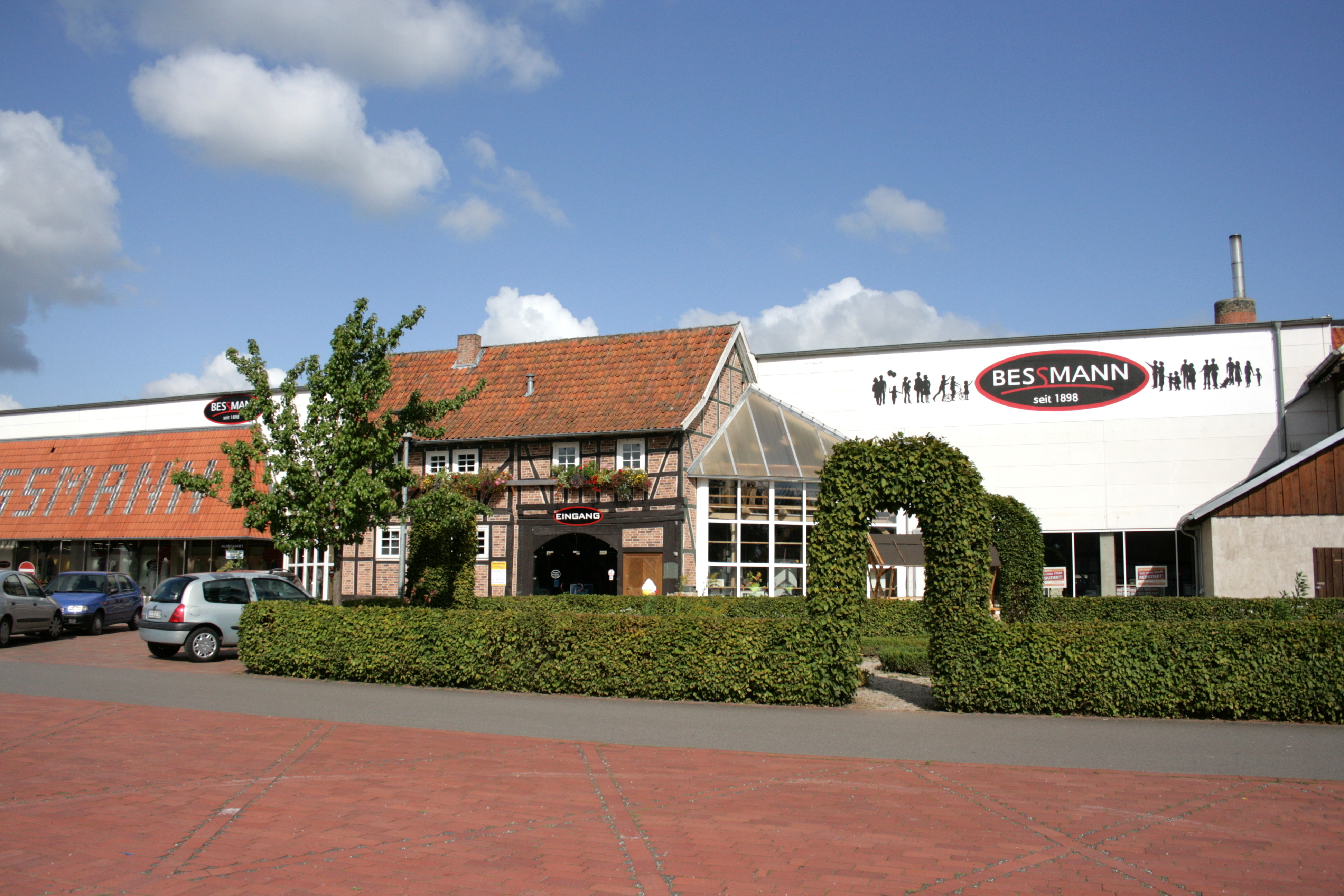 An der Straße „Auf dem Pfingstrasen“ in Breitenworbis (Eichsfeld)